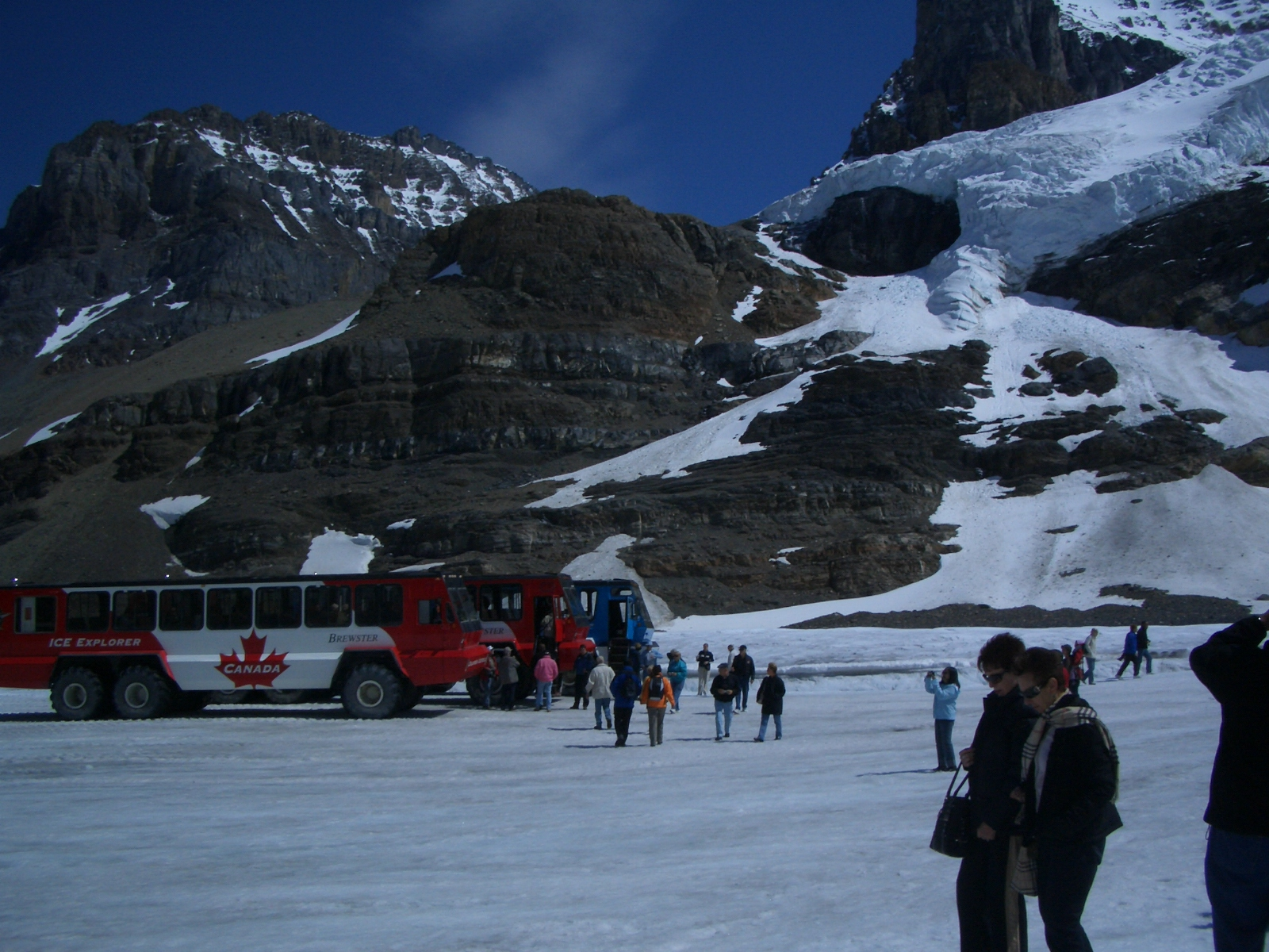 Adjusted image